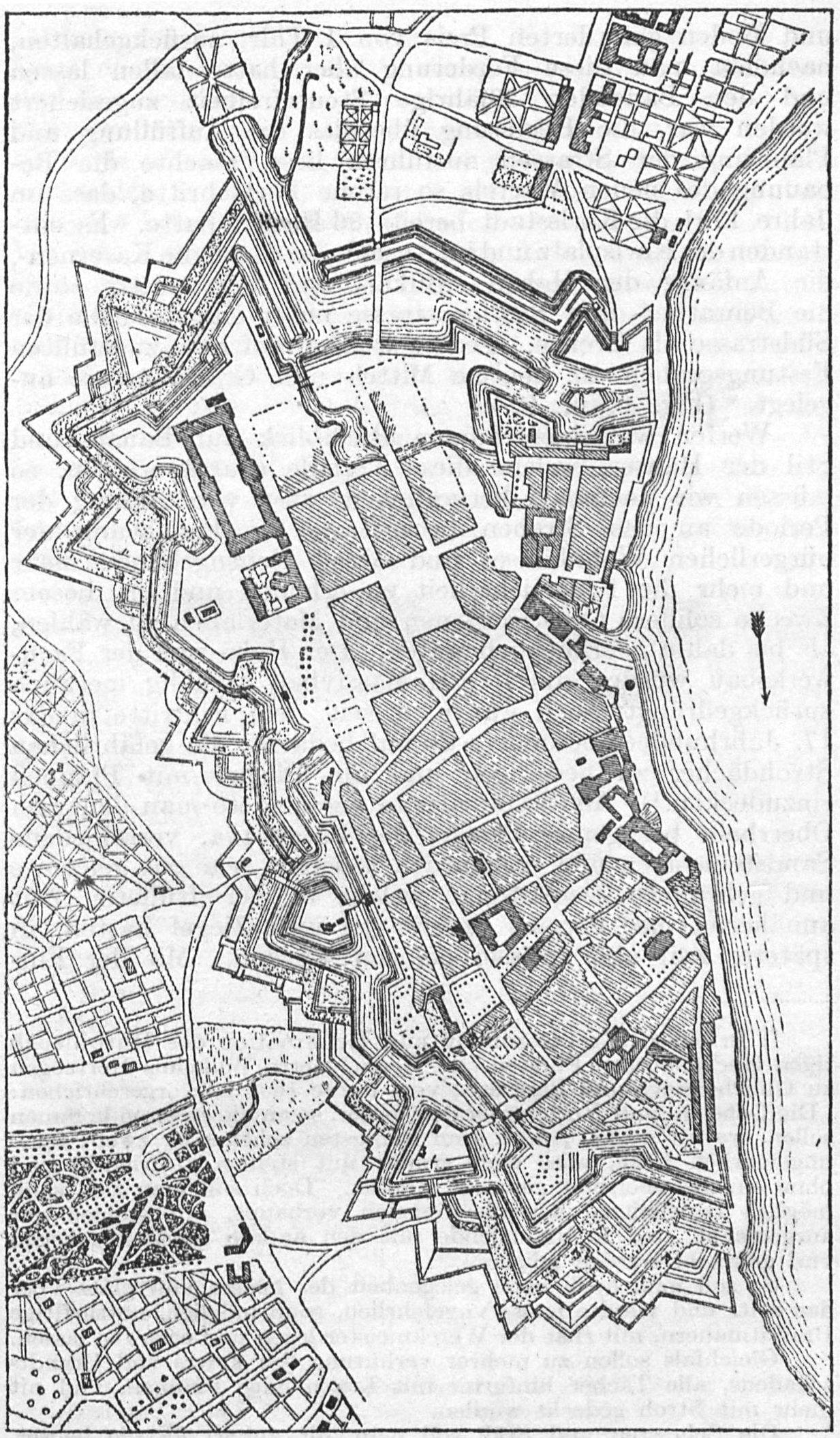 Plan von Düsseldorf im Jahr 1796